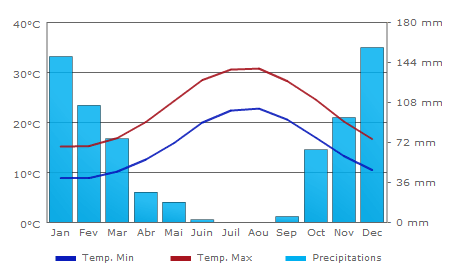 Climat - Rhodes - Égée Méridionale